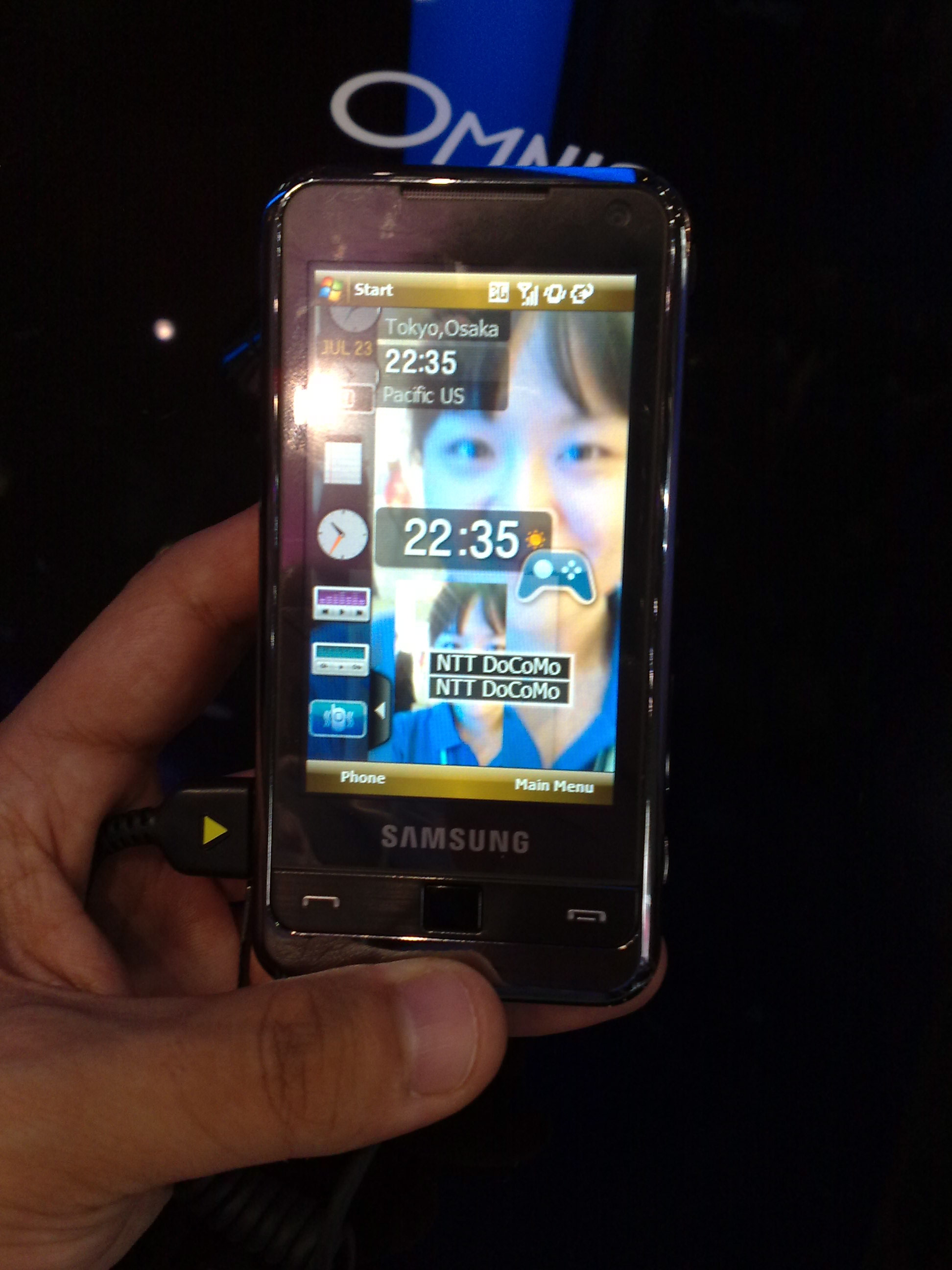 [Fonte